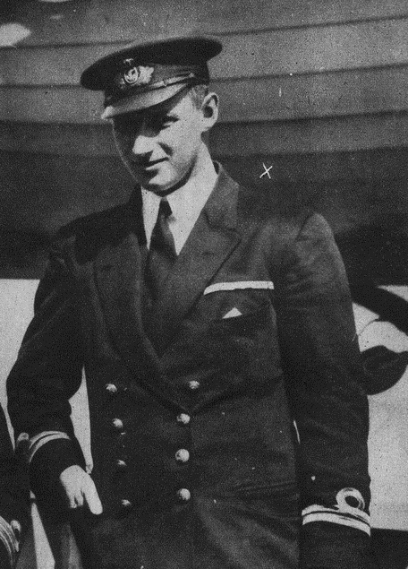 Knud, prince héritier de Danemark